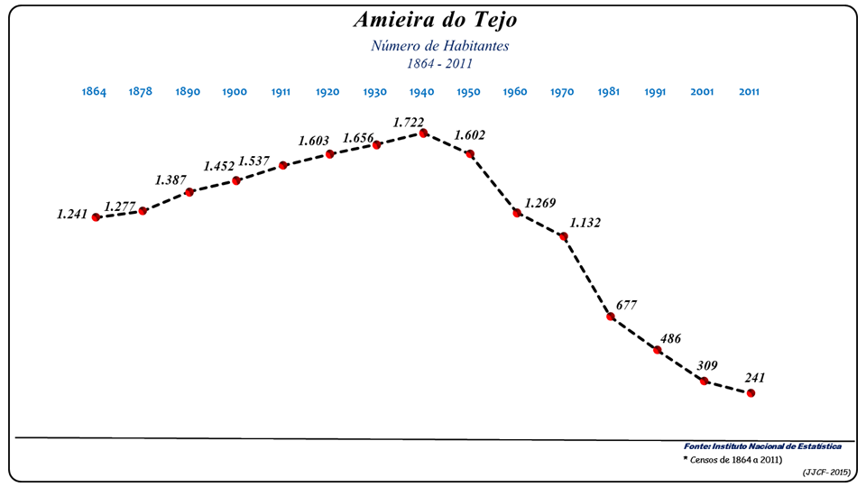 Evolução da População